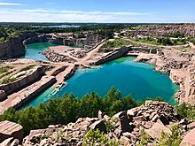 ındustry